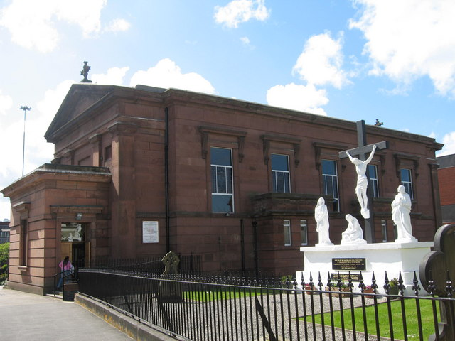 St. Werburgh's RC Church, Birkenhead